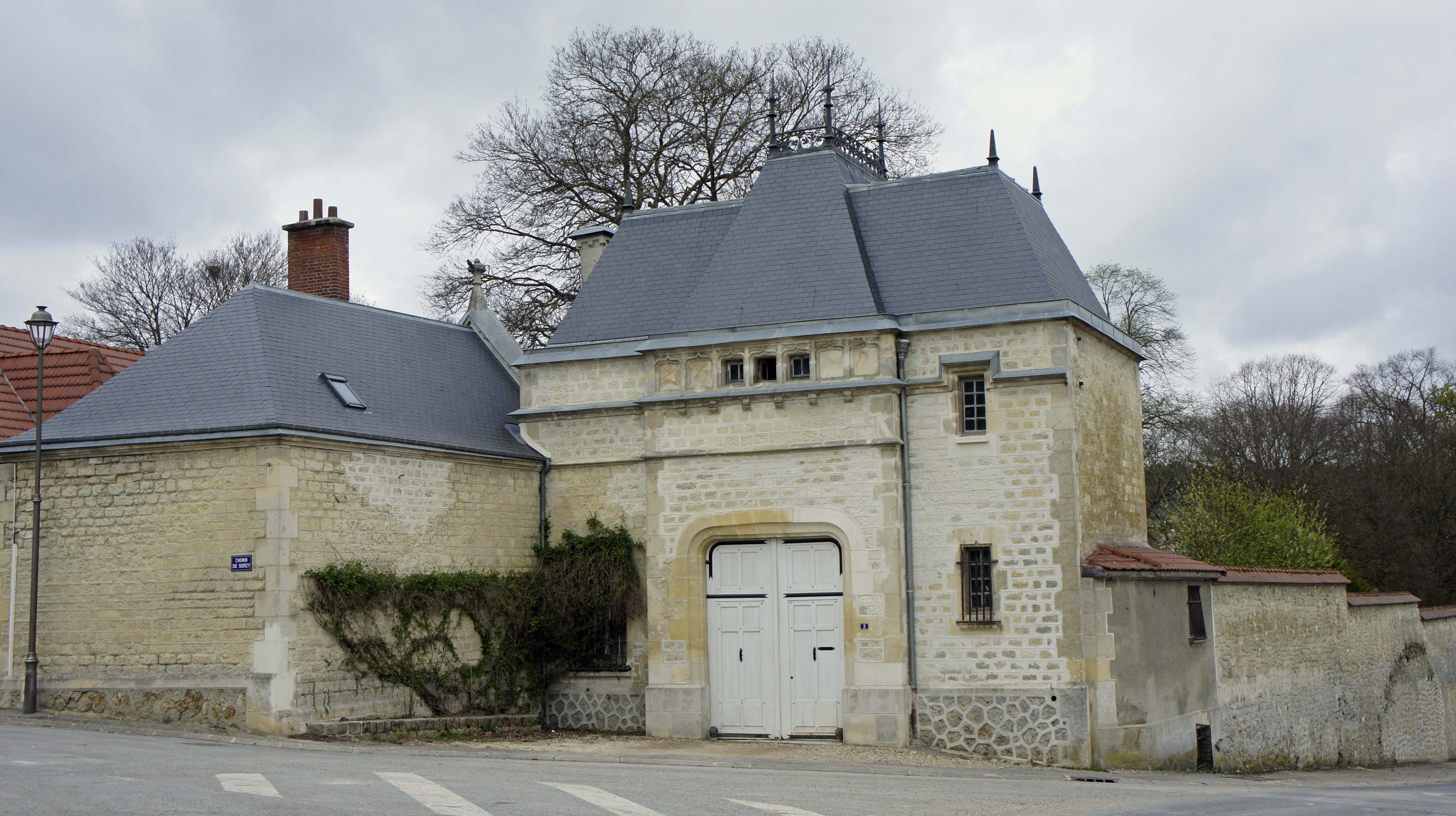 Entrée du château à Branscourt depuis la place centrale.